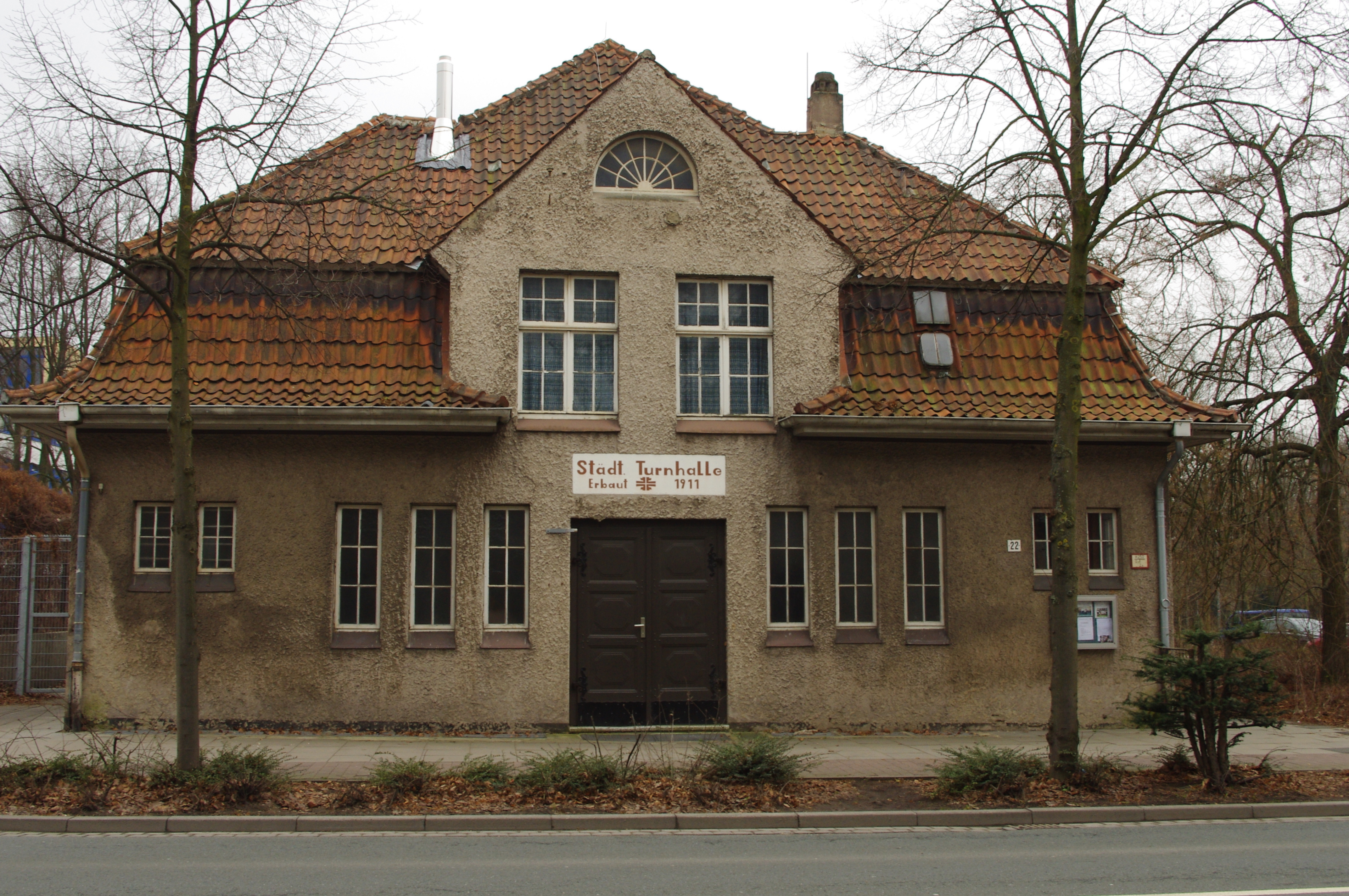 Stadtturnhalle (erbaut 1911)